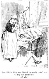 Illustration from Richard Gutschmidt for "Lissy" by Bernhardine Schulze Smidt 1926